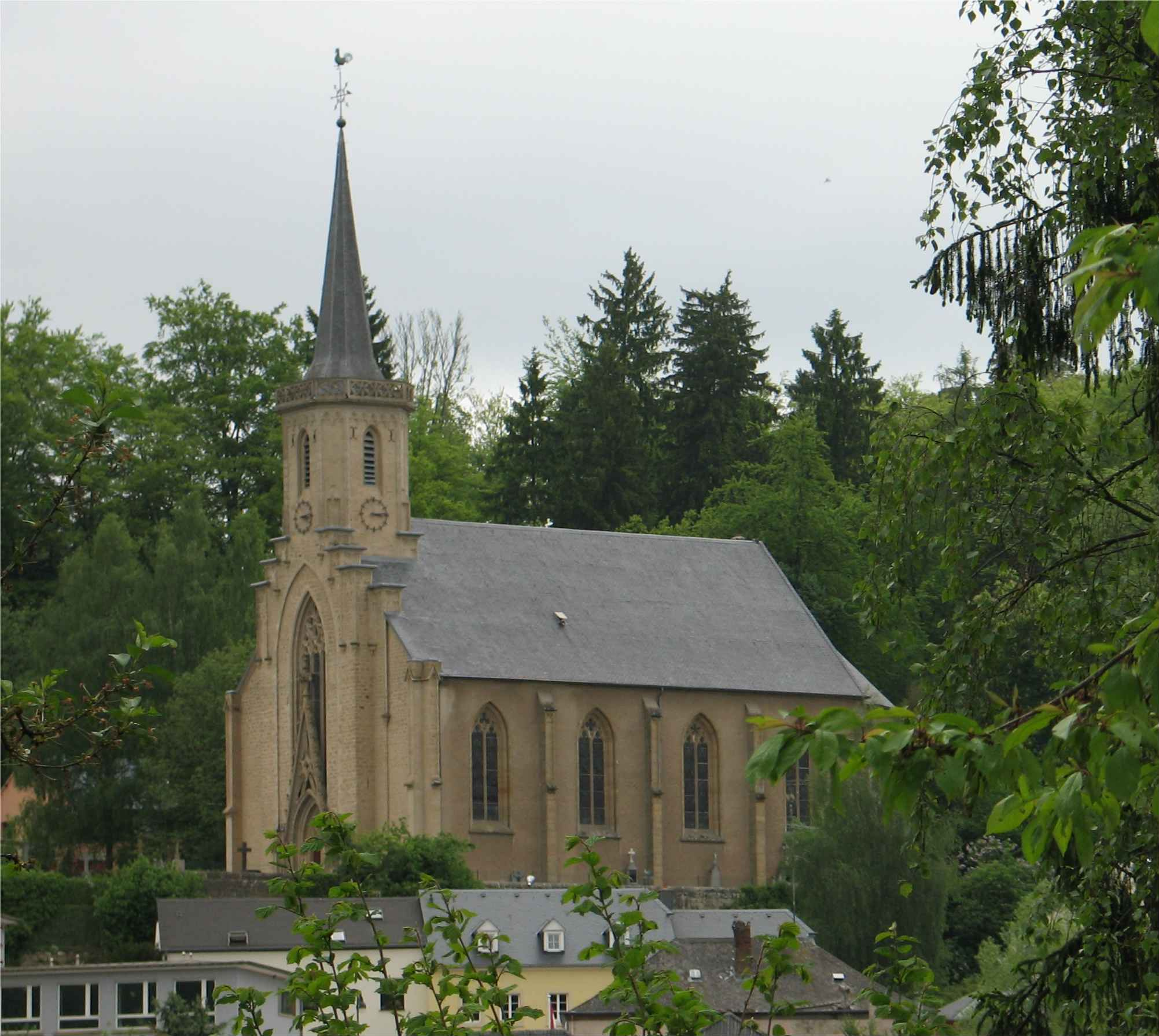 L'église du village luxembourgeois de Fischbach